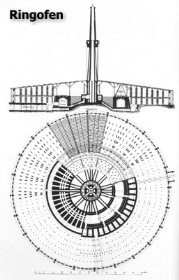 Skitse af en ringovn fra Friedrich Eduard Hoffmanns (1818-1900) patentansøgning i 1858.